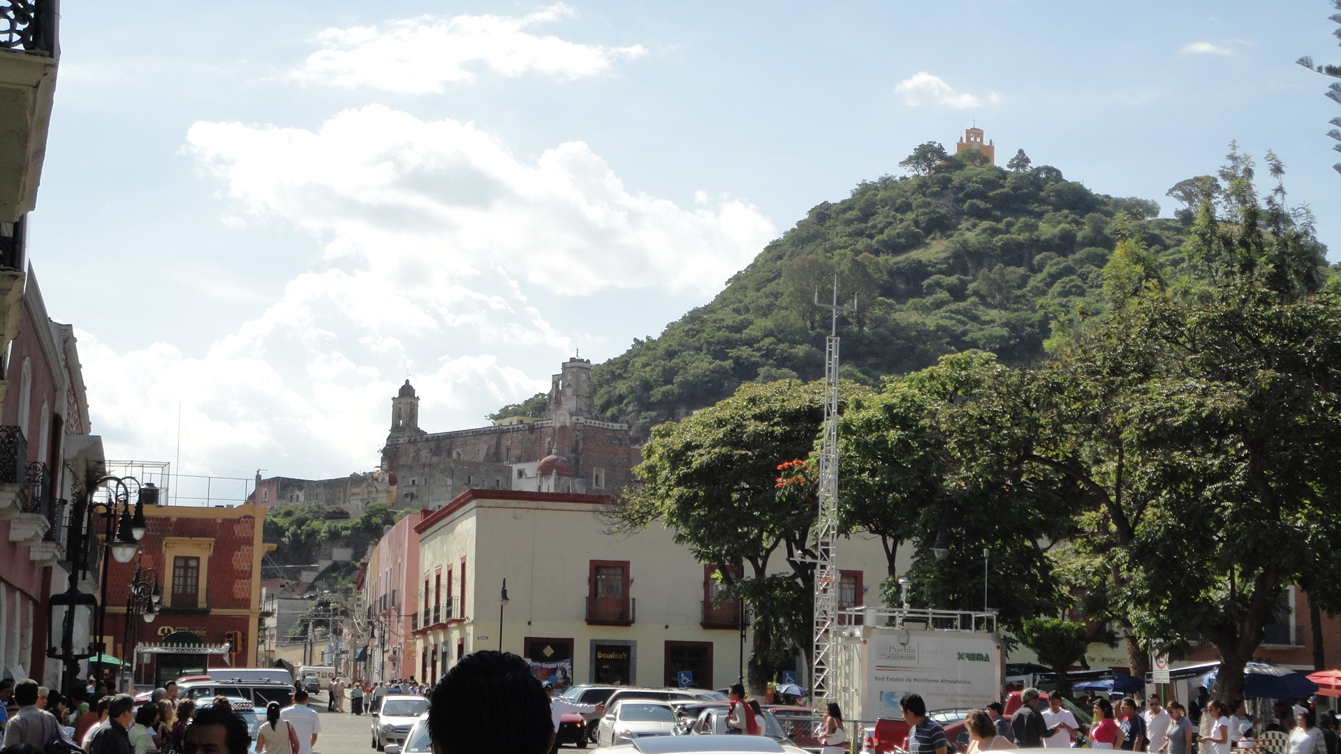 Vista del cerro de San Miguel desde el zócalo